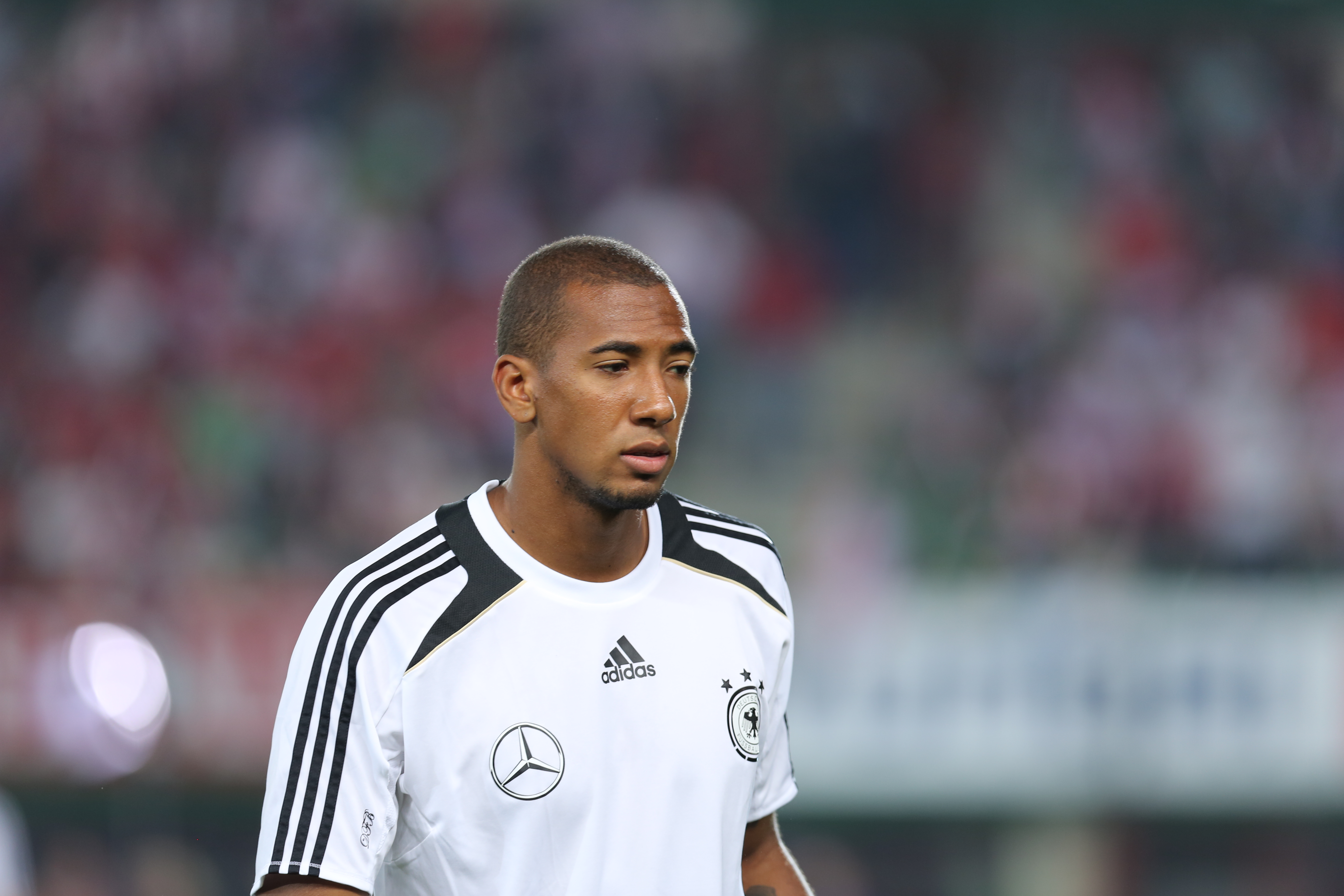 Fußball-Weltmeisterschaft 2014/Qualifikation (UEFA), Gruppe C, 11. September 2012, Österreich gegen Deutschland im Wiener Ernst-Happel-Stadion. The making of this work was supported by Wikimedia Austria. For other files made with the support of Wikimedia Austria, please see the category Supported by Wikimedia Österreich.